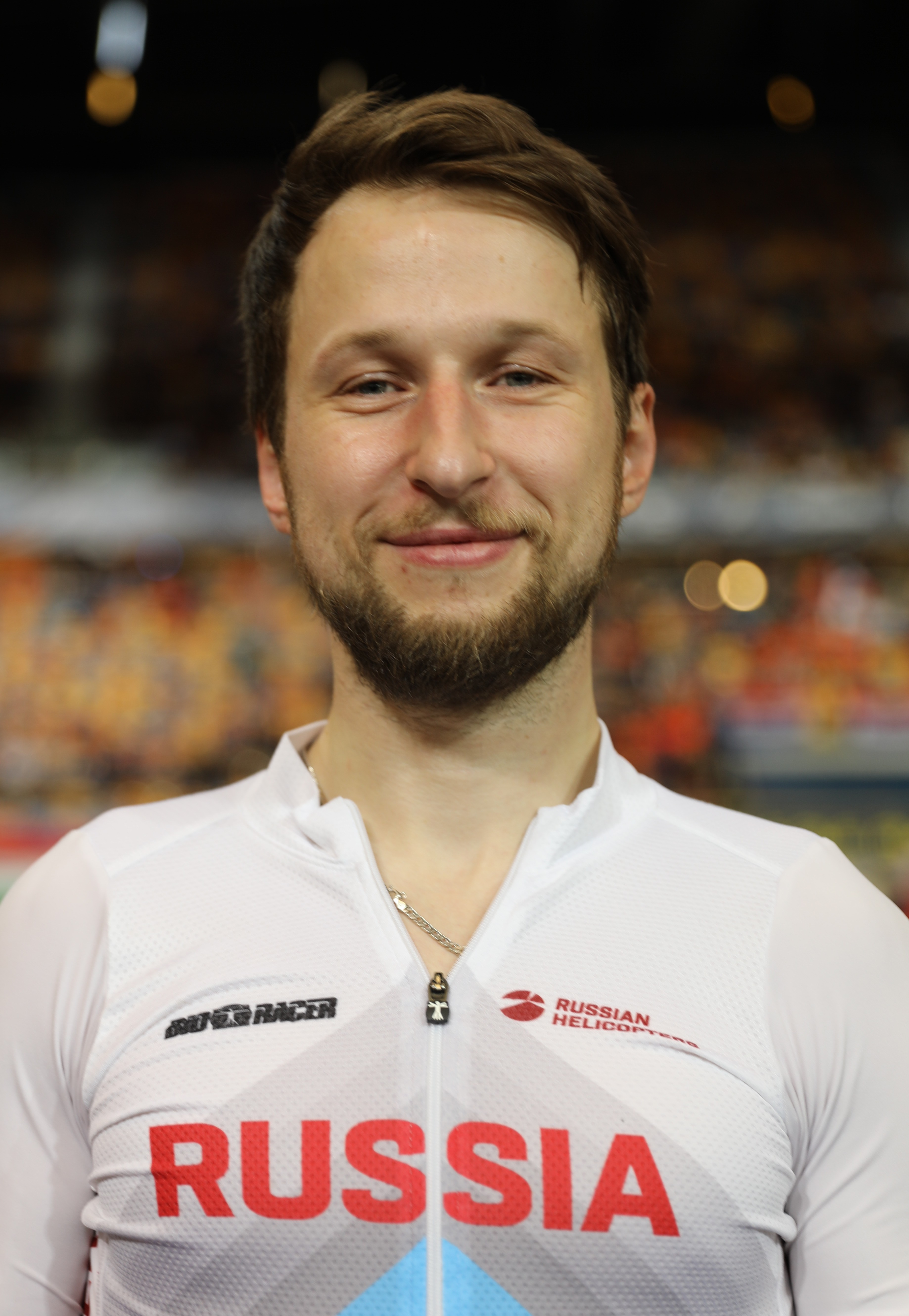 Pavel Yakushevskiy, russischer Radsportler